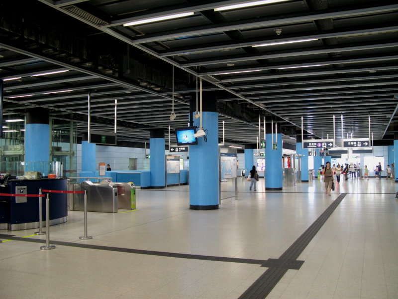 Hang Hau Station